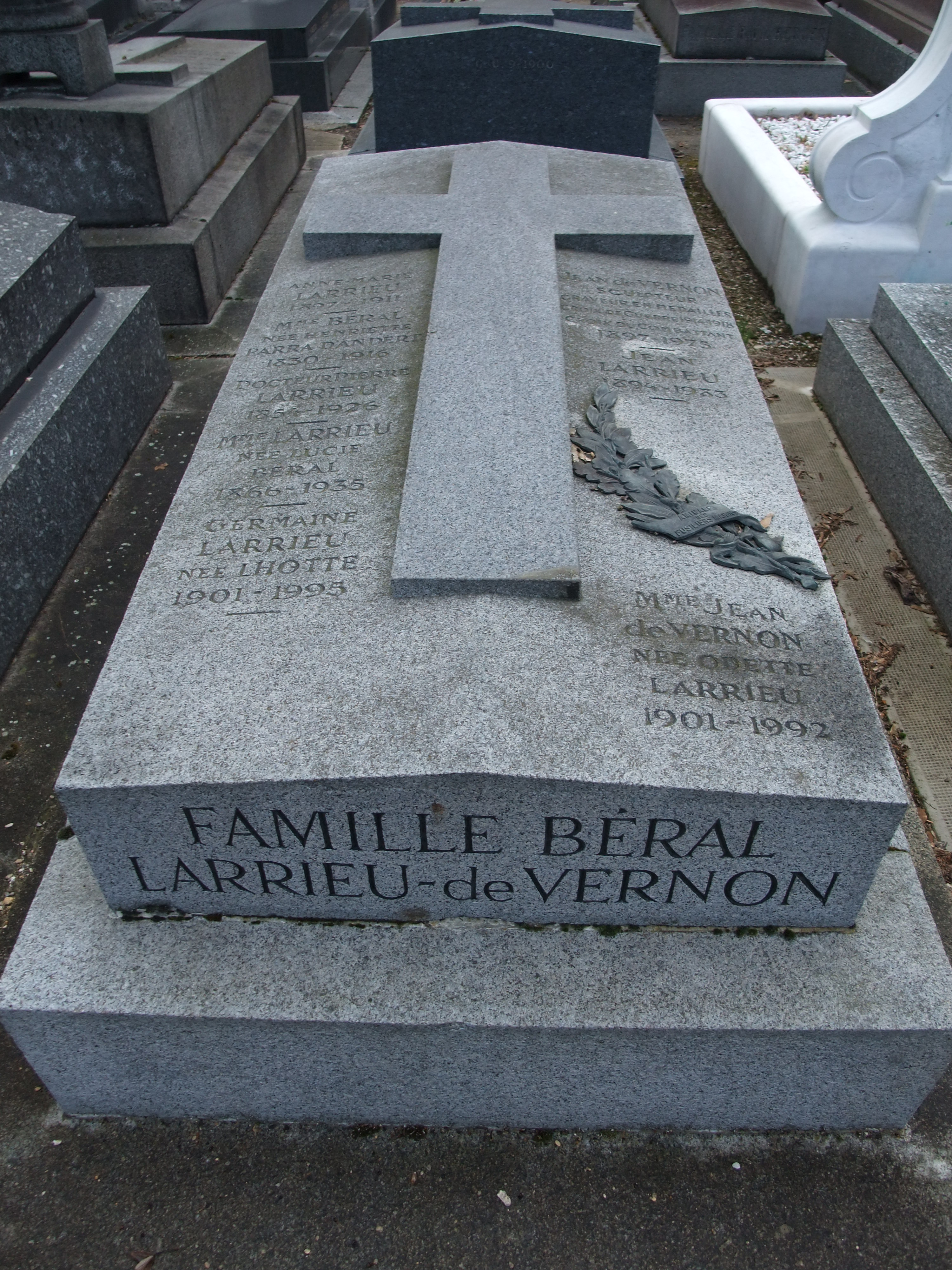 tombe de Jean de Vernon, cimetière du Montparnasse